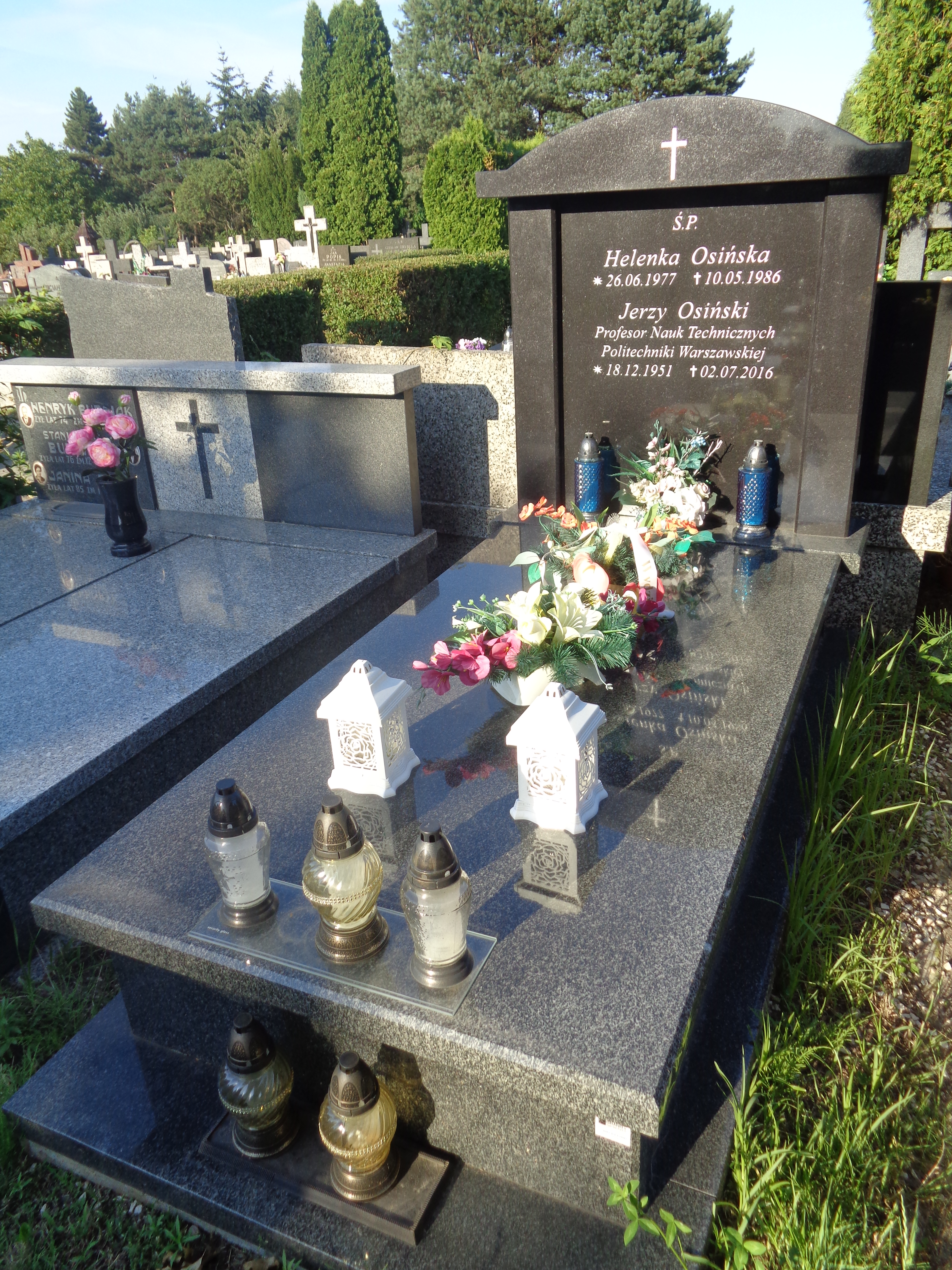 Grób Jerzego Osińskiego na Cmentarzu przy ul Renety